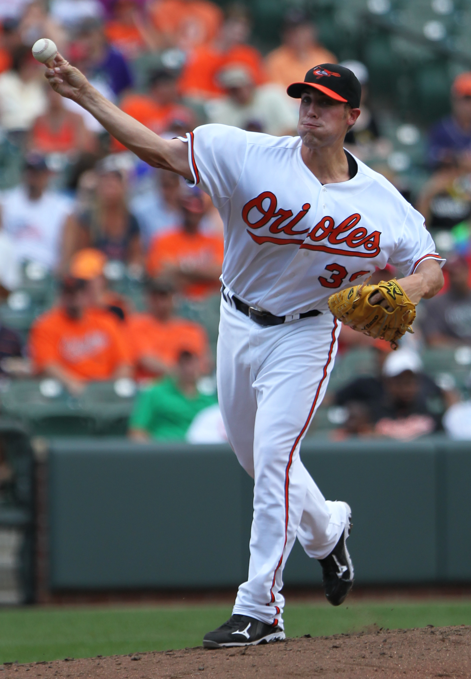 Mitch Atkins